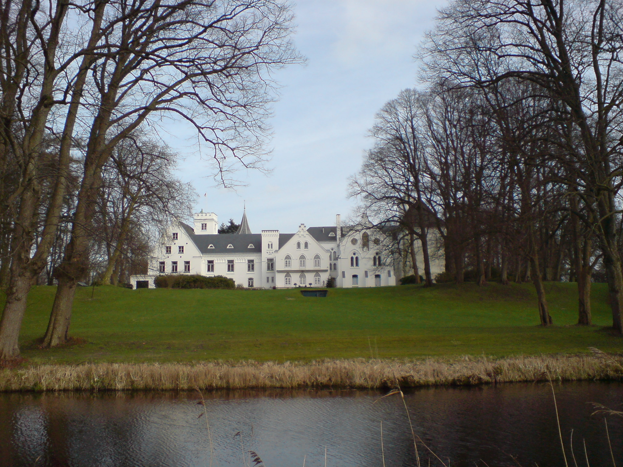 Description=Breitenburg_Westflügel_Gartenseite Source=myself Date=03.2008 Author=PodracerHH